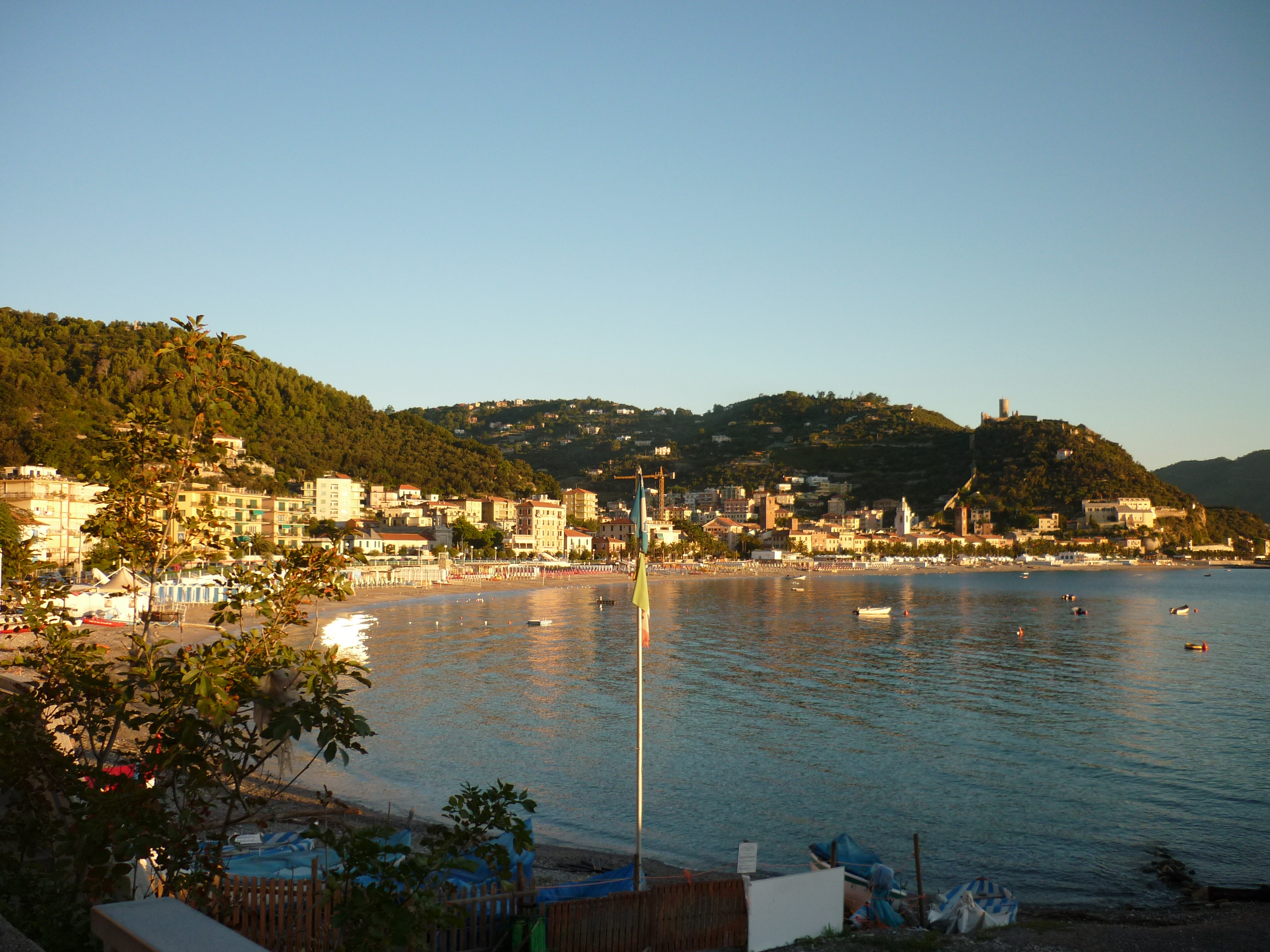 Panorama di Noli (SV)